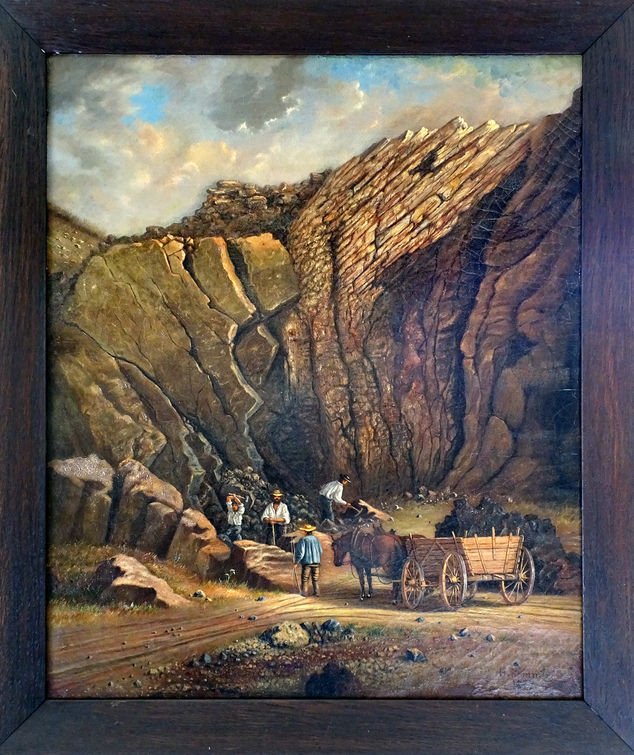 Der Steinbruchbetrieb in der Blauen Kuppe. Öl auf Leinwand. 1877 gemalt von Herrmann Kemnitz (*1838 †1921). Das Gemälde hängt im Stadtmuseum Eschwege.